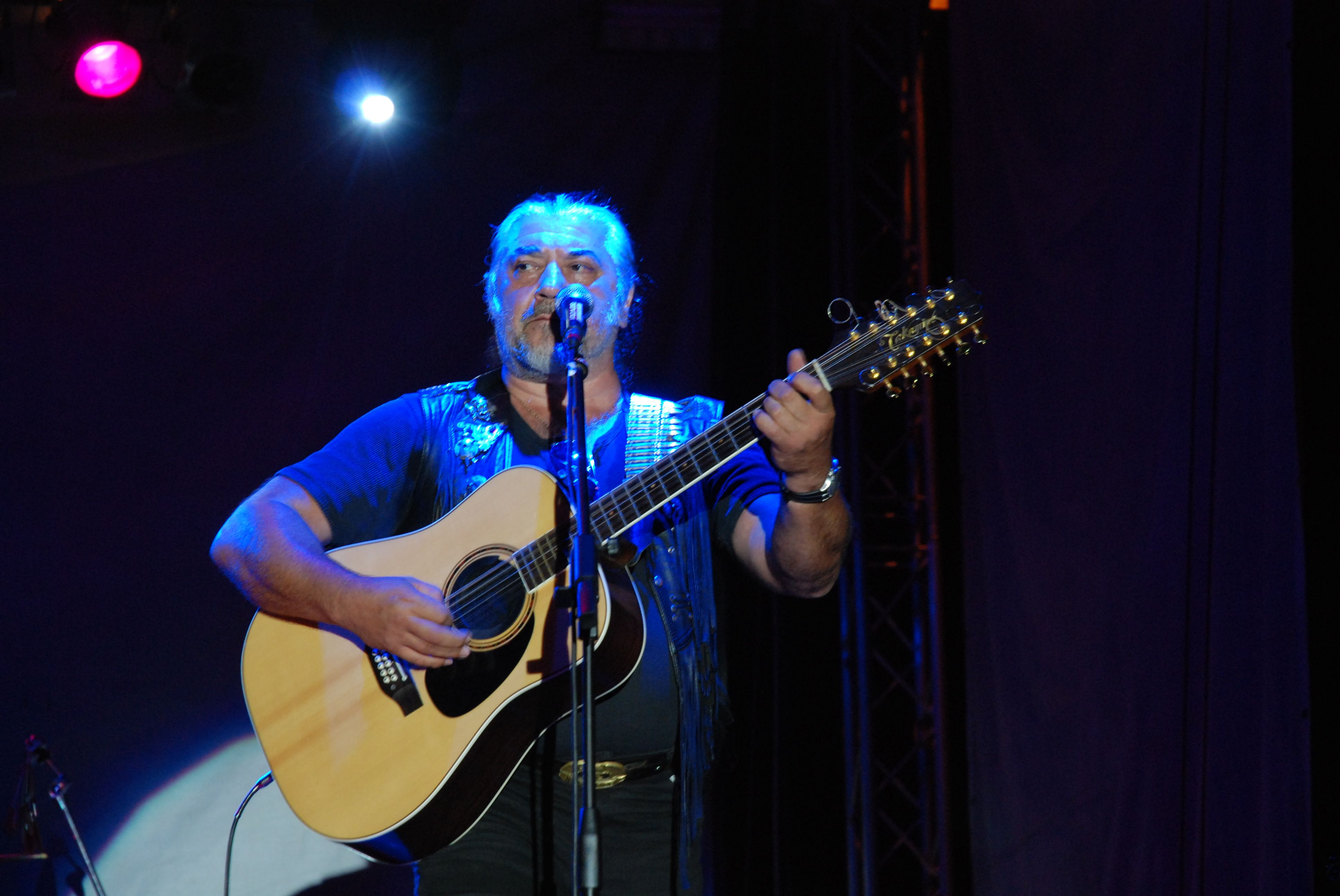 Nicu Covaci, concert al formației Phoenix, Șimleu Silvaniei, 14 iulie 2007.